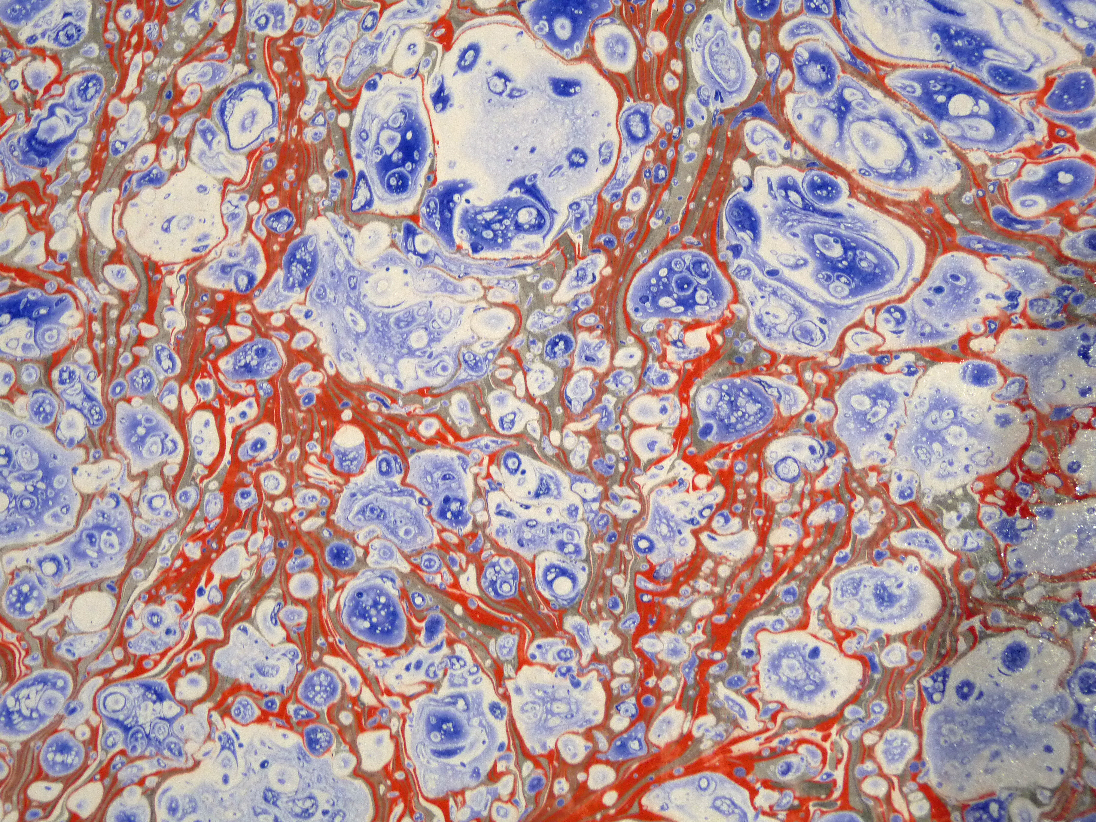 Démonstration de la technique de l'ebru (papier marbré traditionnel turc) dans le cadre du Festival international de géographie 2012 à Saint-Dié-des-Vosges (pays invité : la Turquie)